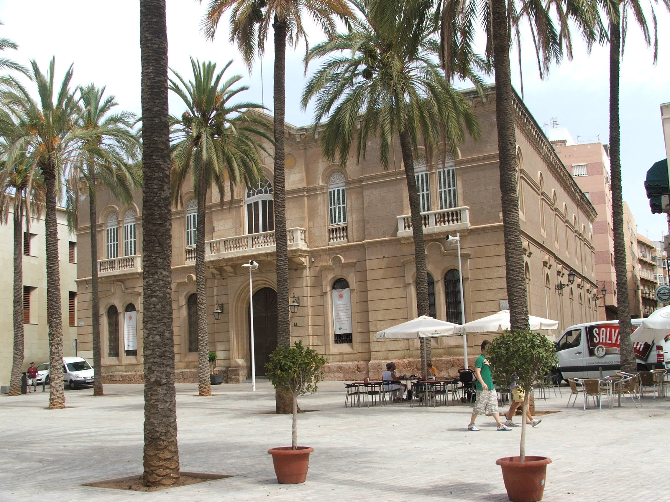 Fotografía de la fachada principal del Palacio Episcopal de Almería, Andalucía, España.